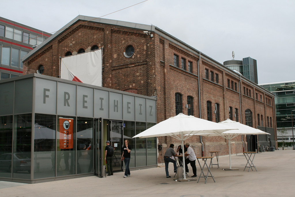 Landesparteitag 2009 des Landesverbandes Bayern der Piratenpartei Deutschland im "Freiheiz" München, August 2009